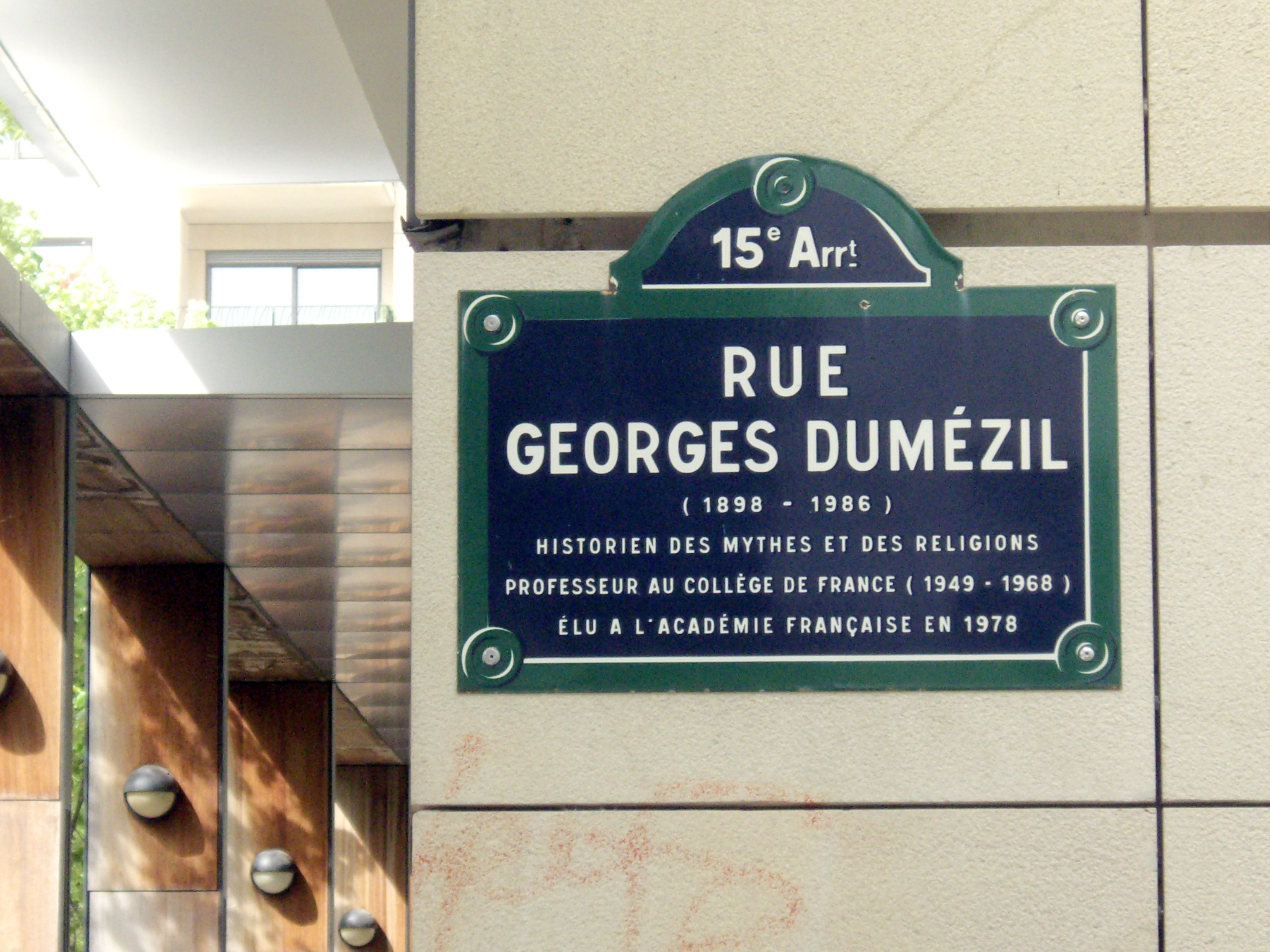 Rue Georges-Dumézil, Paris 15e. « Georges Dumézil (1898-1986), historien des mythes et des religions, professeur au Collège de France (1949-1968), élu à l'Académie française en 1978. »